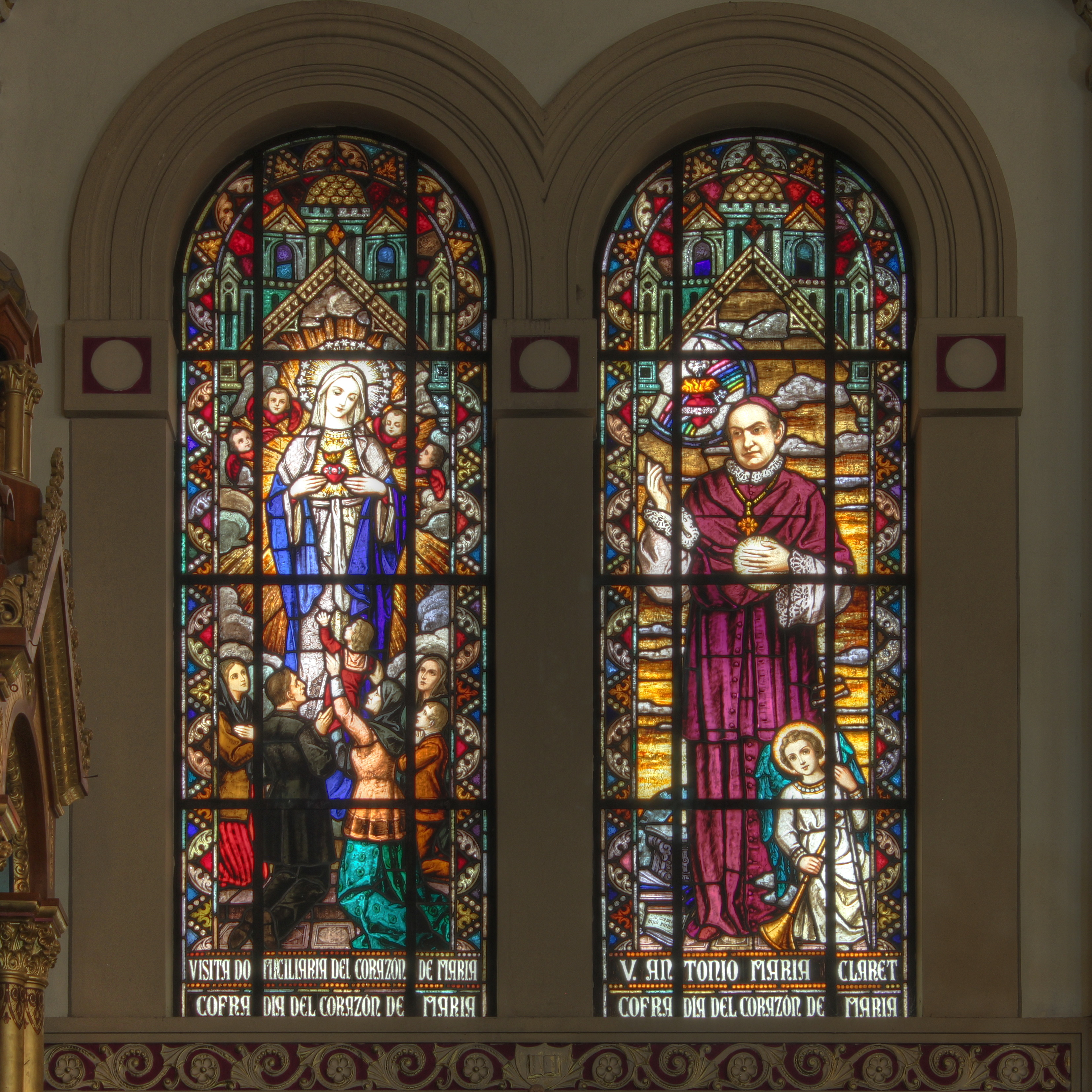 Parroquia Inmaculado Corazón de María. Imagen de la Visita Domiciliaria del Corazón de María y San Antonio María Claret